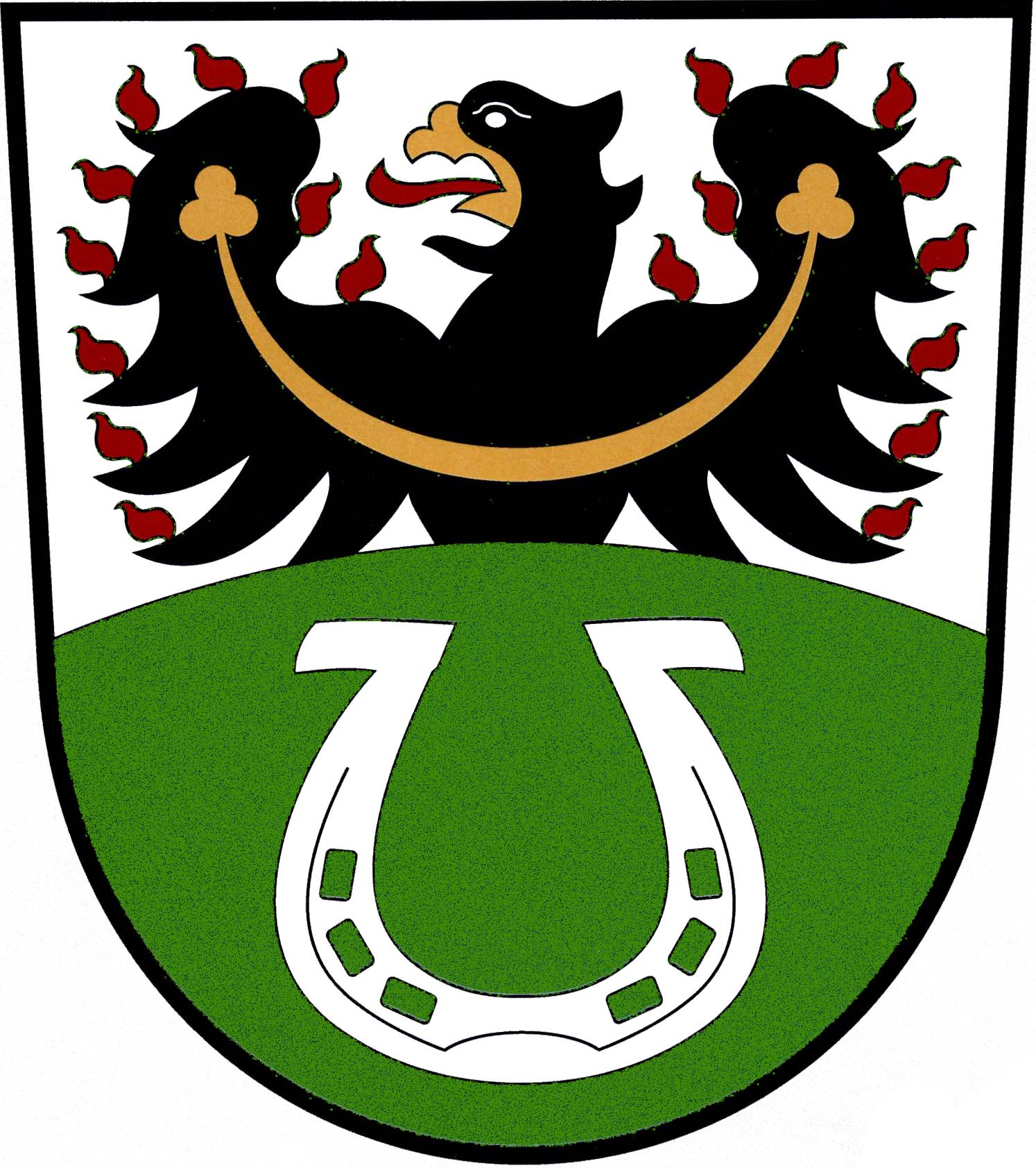 Česky: znak obce Chotýčany